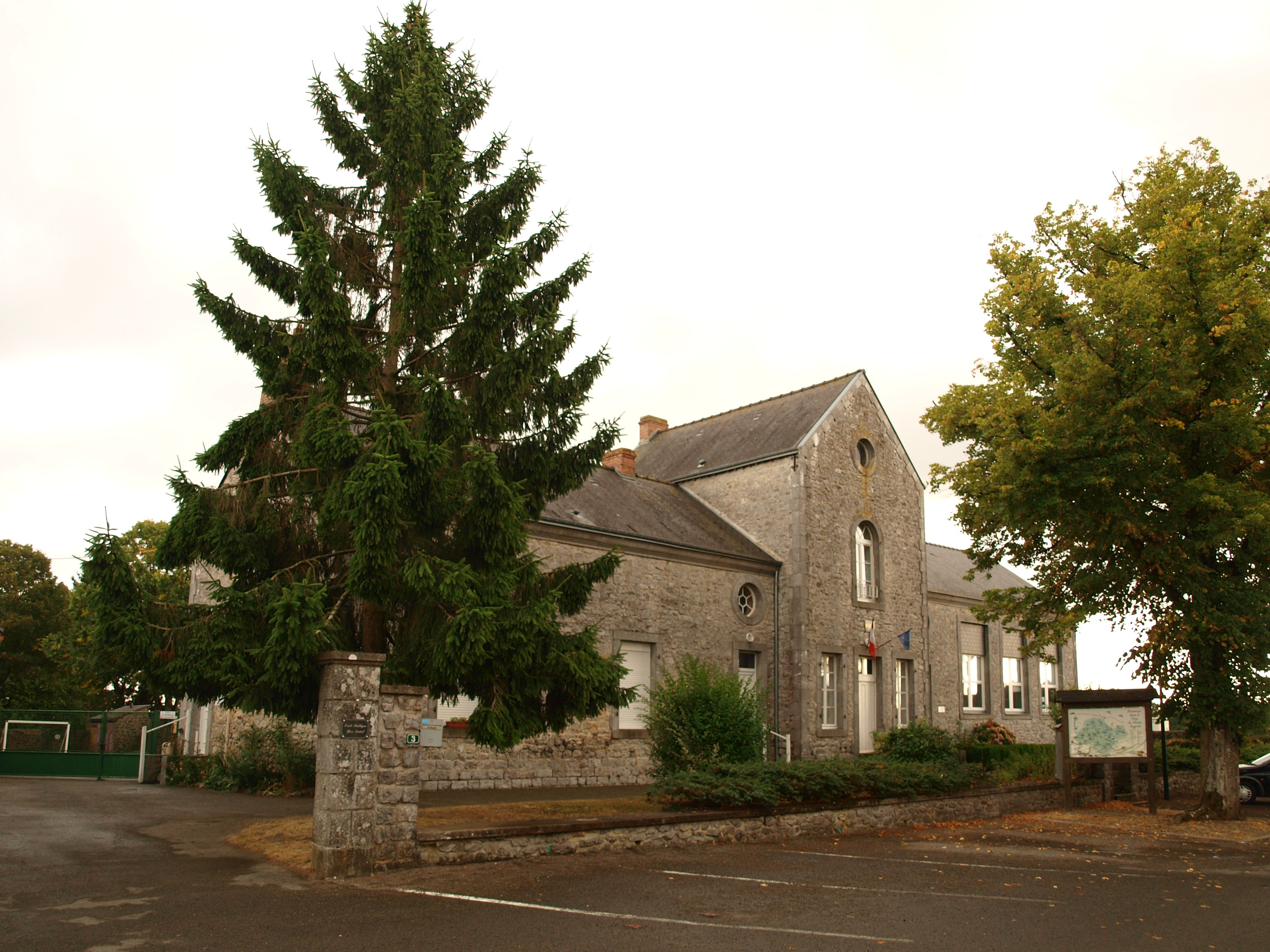 Saint-Georges-le-Fléchard (Mayenne, France) ; mairie-école